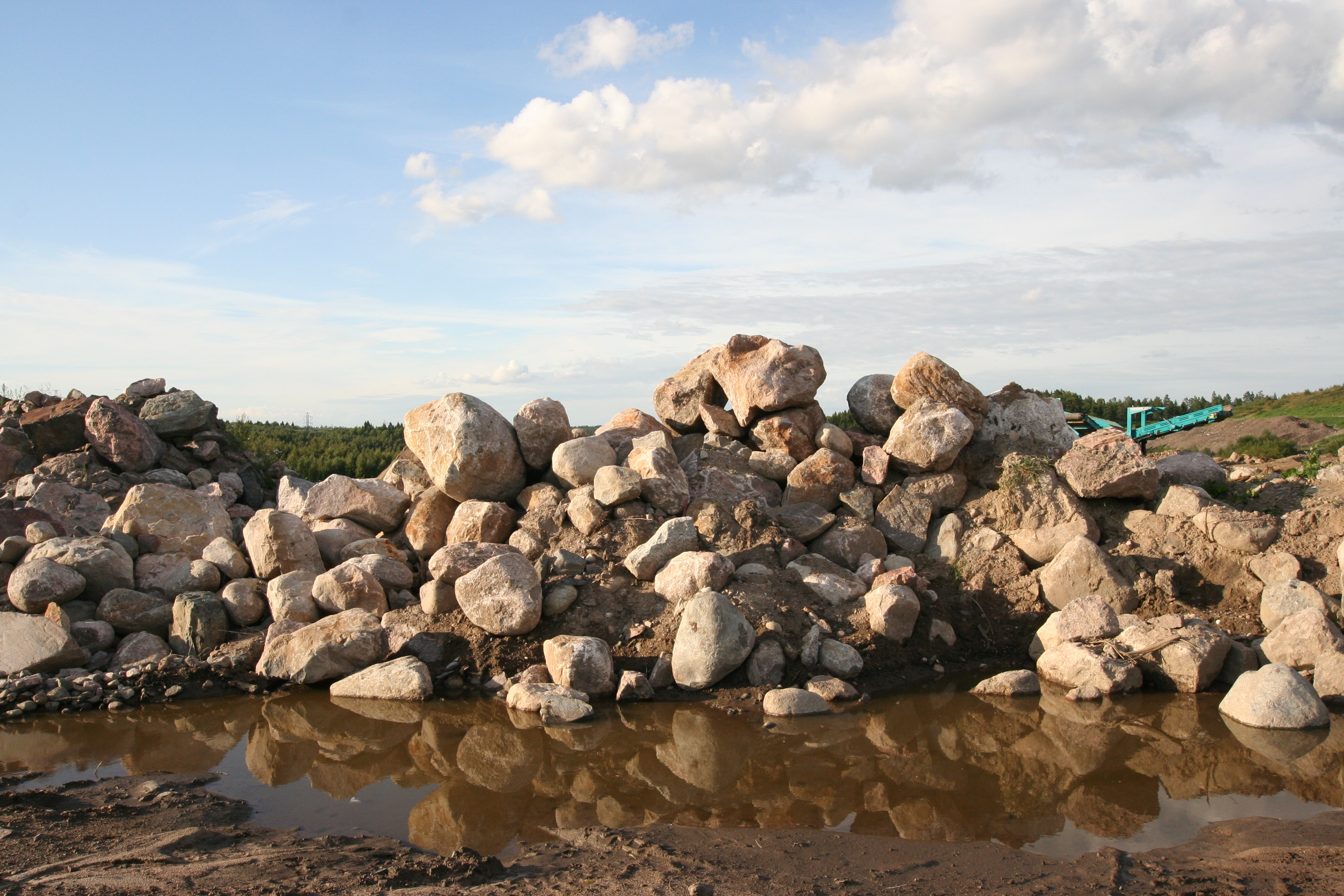 Kivikasoja, joita käytetään Vuosaaren huipun maisemaa rakennettaessa.